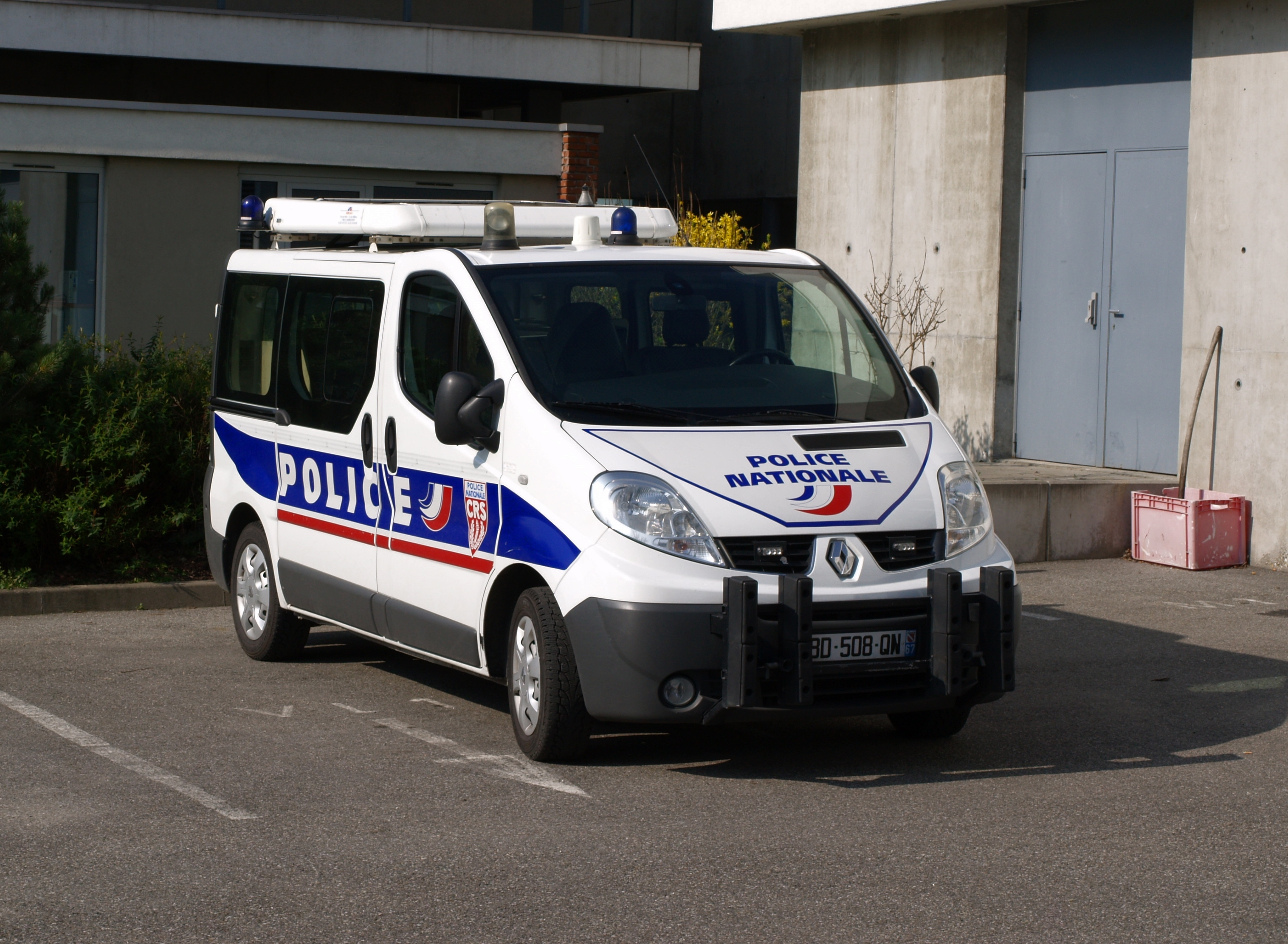 Fourgon Renault Trafic de la brigade autoroutière des CRS, Strasbourg